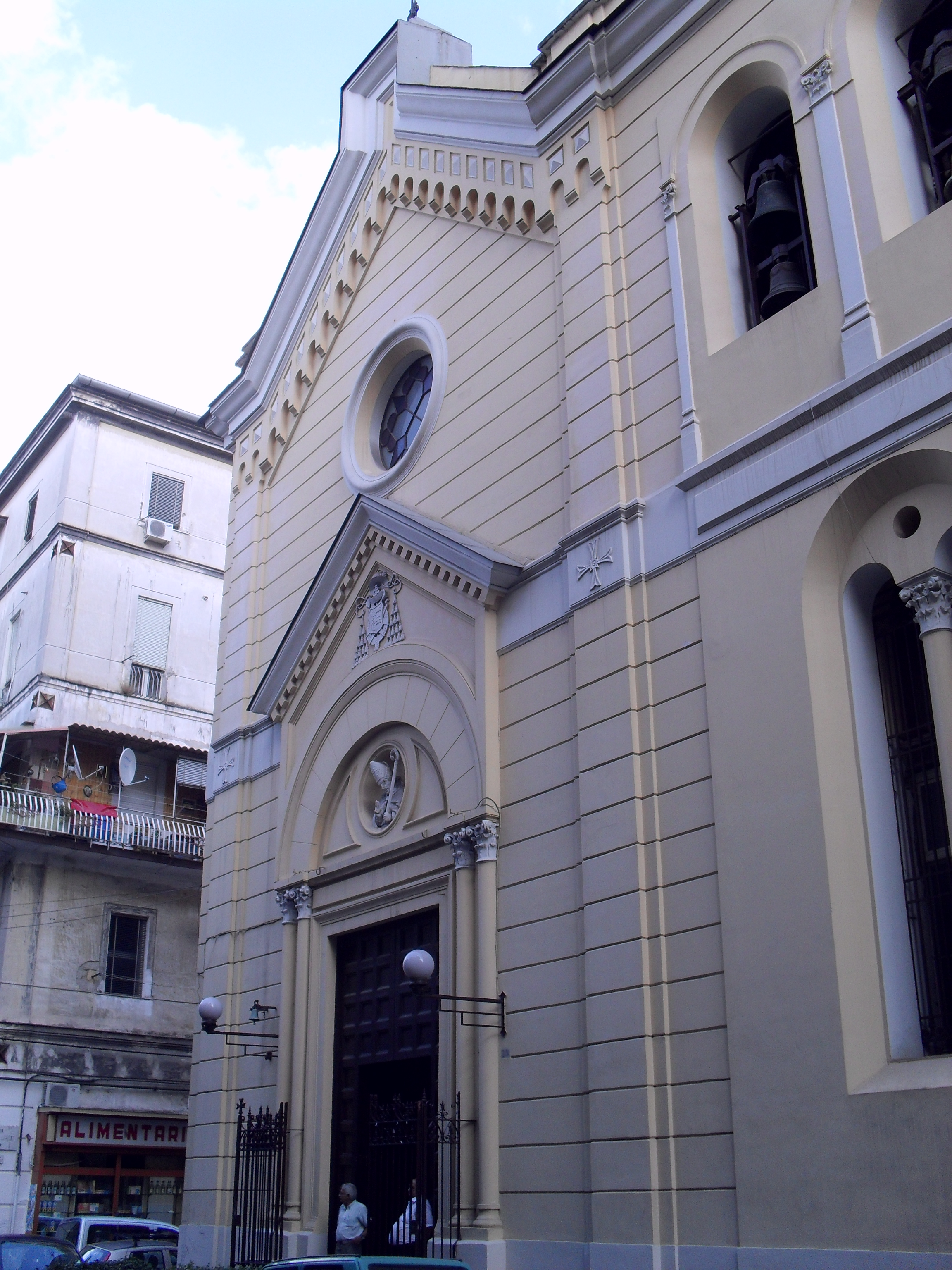 Chiesa di Sant'Alfonso all'Arenaccia (Napoli)